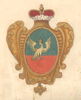 Суздаль, герб (1730)